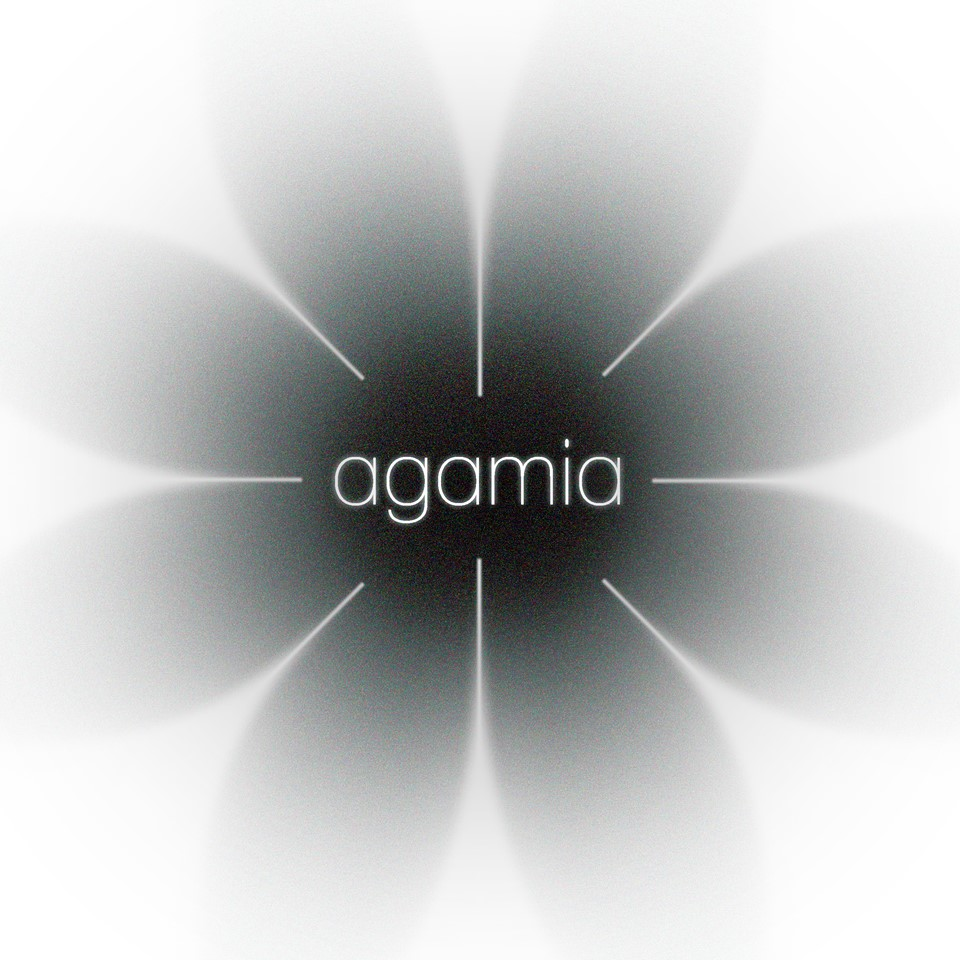 El símbolo de la agamia está formado por un espacio central negro que representa al sujeto y por líneas blancas que parten de él expandiéndose y ocupando todo el espacio. Estas líneas no representan vínculos entre sujetos individuales, como en el gamos, sino vínculos entre el sujeto y su entorno integral.